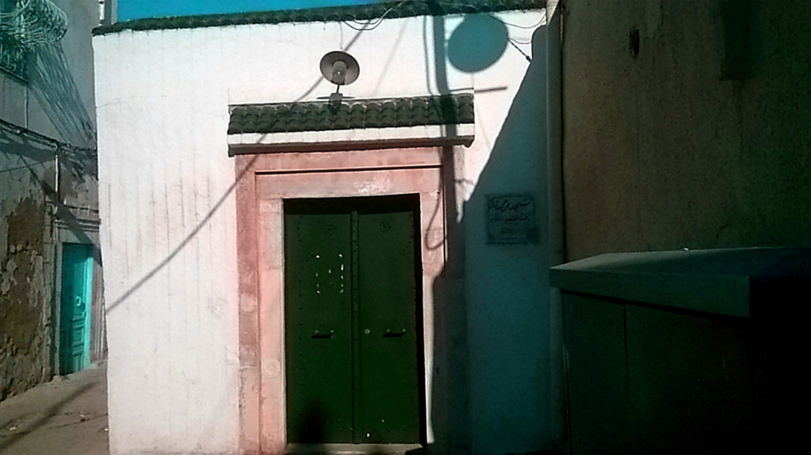 Mosquée Ben Hamida, bab lakouas, la médina de Tunis